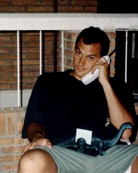 Steve Trumbo